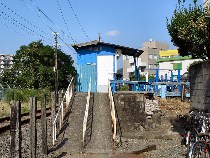 熊本電気鉄道黒髪町駅 駅舎 撮影者/著者/著作権保有者 : MK Products (本人がアップロード) 撮影日 : 2006/09/24 黒髪町駅用にアップロードした画像です。良い画像があれば別の画像に変えてください。